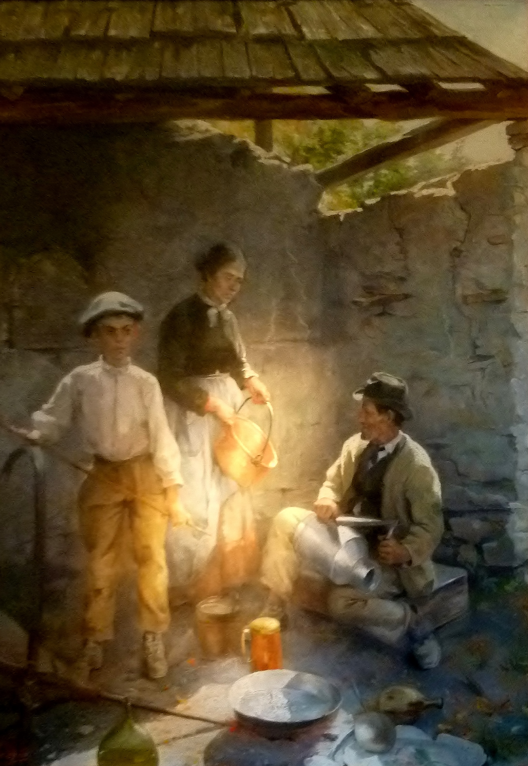 Le rétameur (1899) par Marie Caire-Tonoir; huile sur toile 130 x 165 cm; Musée de la Vallée, Barcelonnette, France